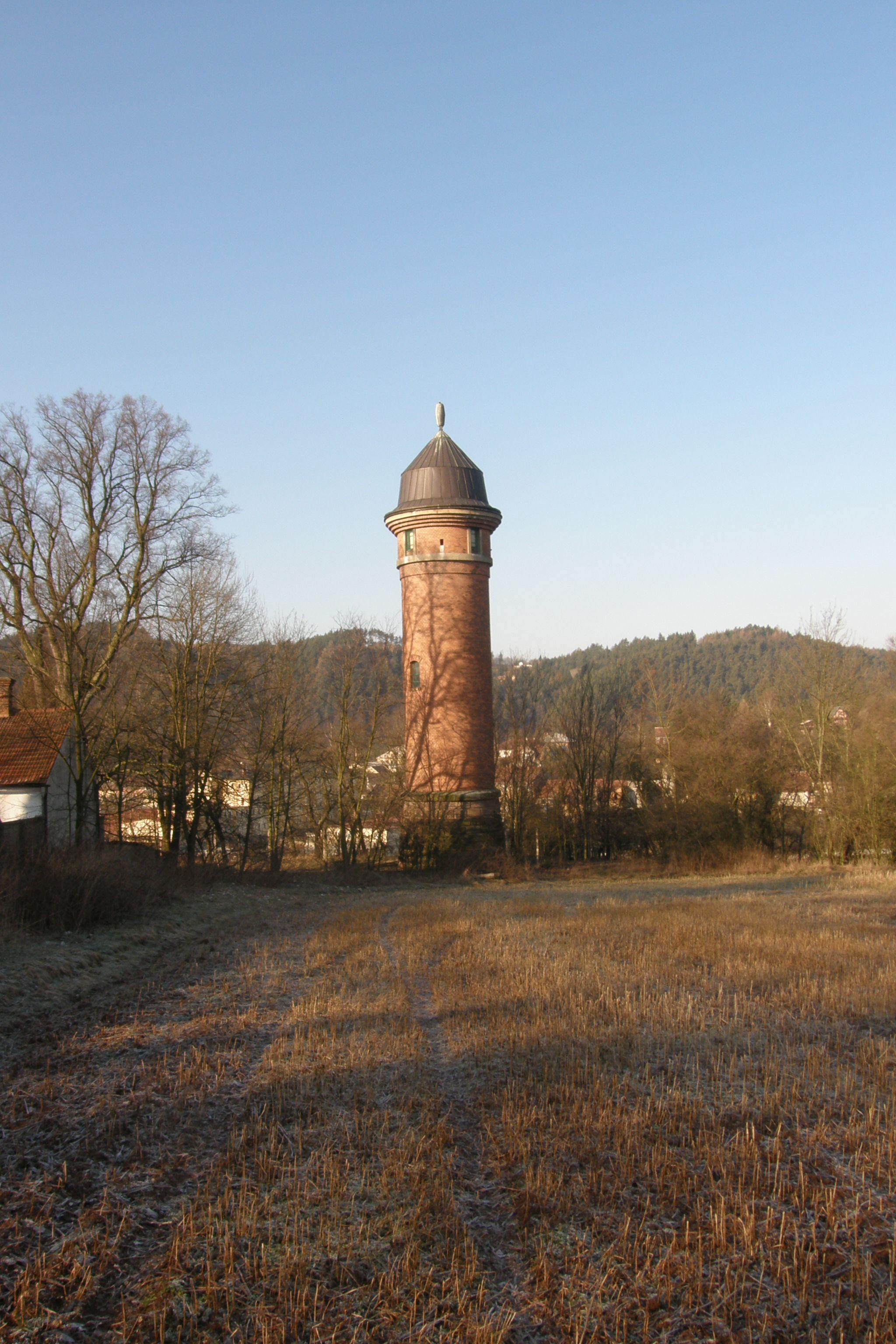 Vodárenská věž I. březovského vodovodu z roku 1911, Letovice če. 30, u Pražské ul. poblíž severozápadního rohu hřbitova.